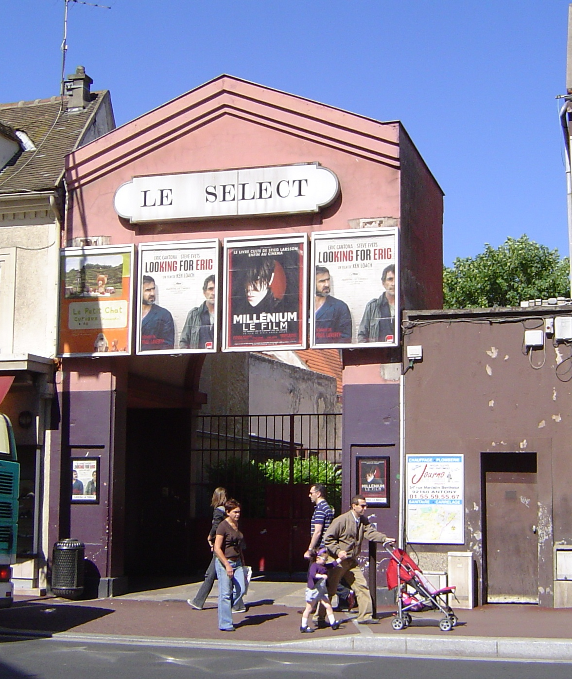 Photos prises à Antony